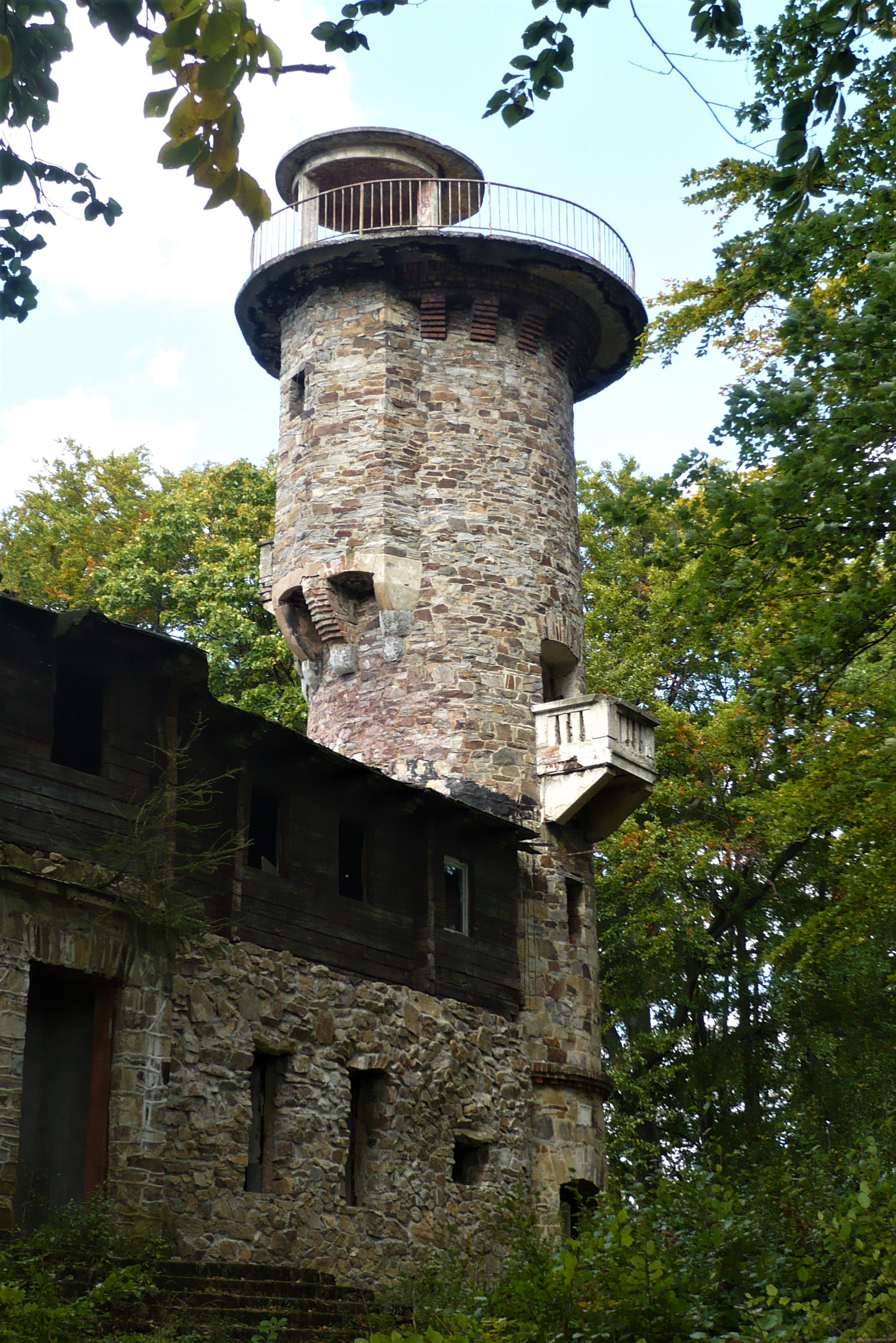 Schronisko na Parkowej Górze